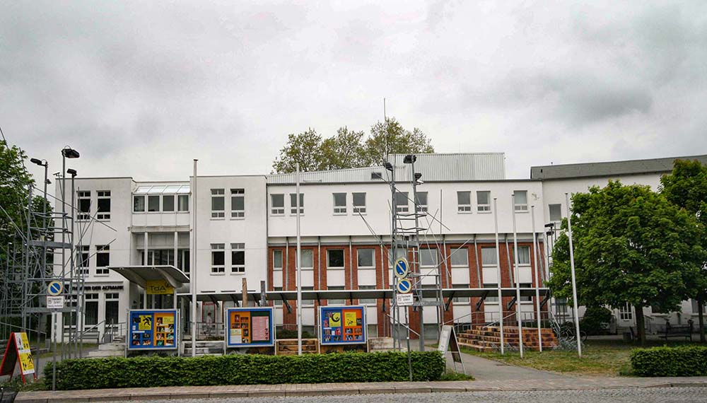 Stendal, Karlstraße 6, Theater der Altmark